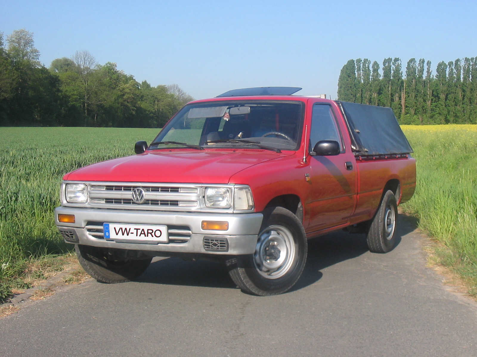 VW Taro, Baujahr 1991